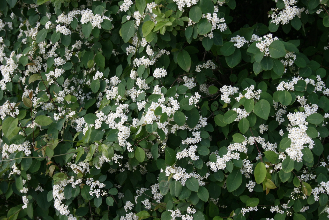 Cotoneaster multiflorus: Habit.